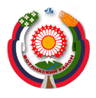 Герб Ботлихского района